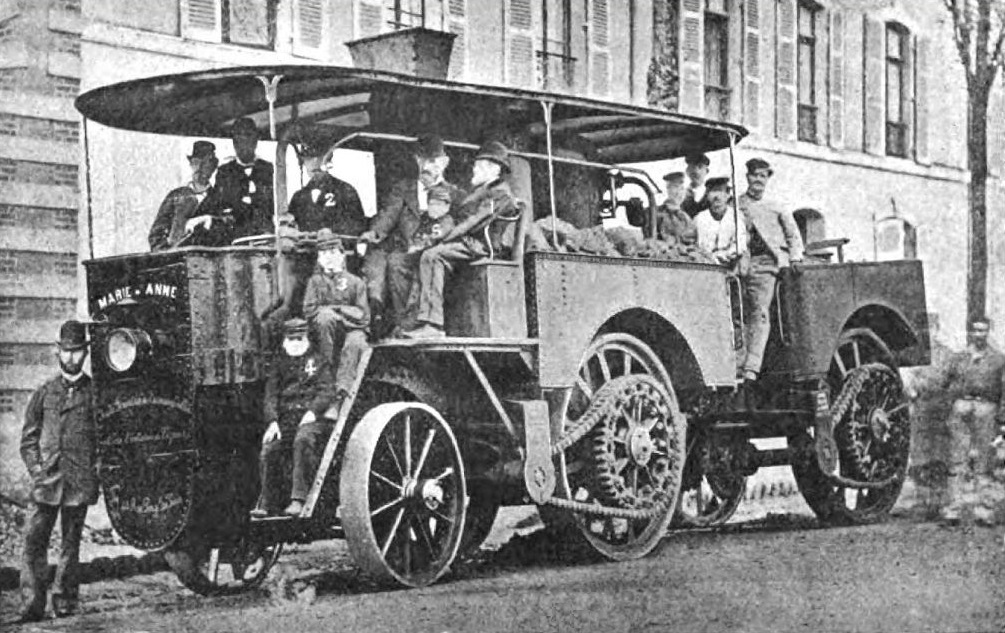 La famille Bollée en 1879, à bord de La Marie-Anne à vapeur : numéro 1 Ernest-Sylvain Bollée (le grand-père) numéro 2 Amédée Bollée (le père) numéro 3 Amédée Bollée (le fils aîné) numéro 4 Léon Bollée (le fils cadet) numéro 5 Camille Bollée (le fils benjamin)